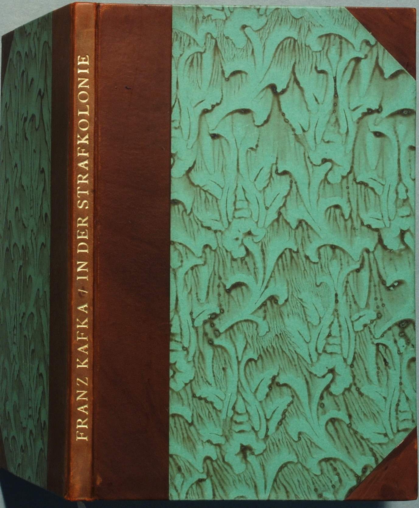 Kafka, Franz: In der Strafkolonie Leipzig: Kurt Wolff 1919, 71 Seiten. Erstausgabe (Wilpert/Gühring² 5, Dietz 50). Verlagseinband in Halbleder (Vorderdeckel 23,3 x 15 cm), Rückentitel in Gold. Einmalige Auflage von 1000 Exemplaren, von der nur ein Teil in Halbleder gebunden wurde.